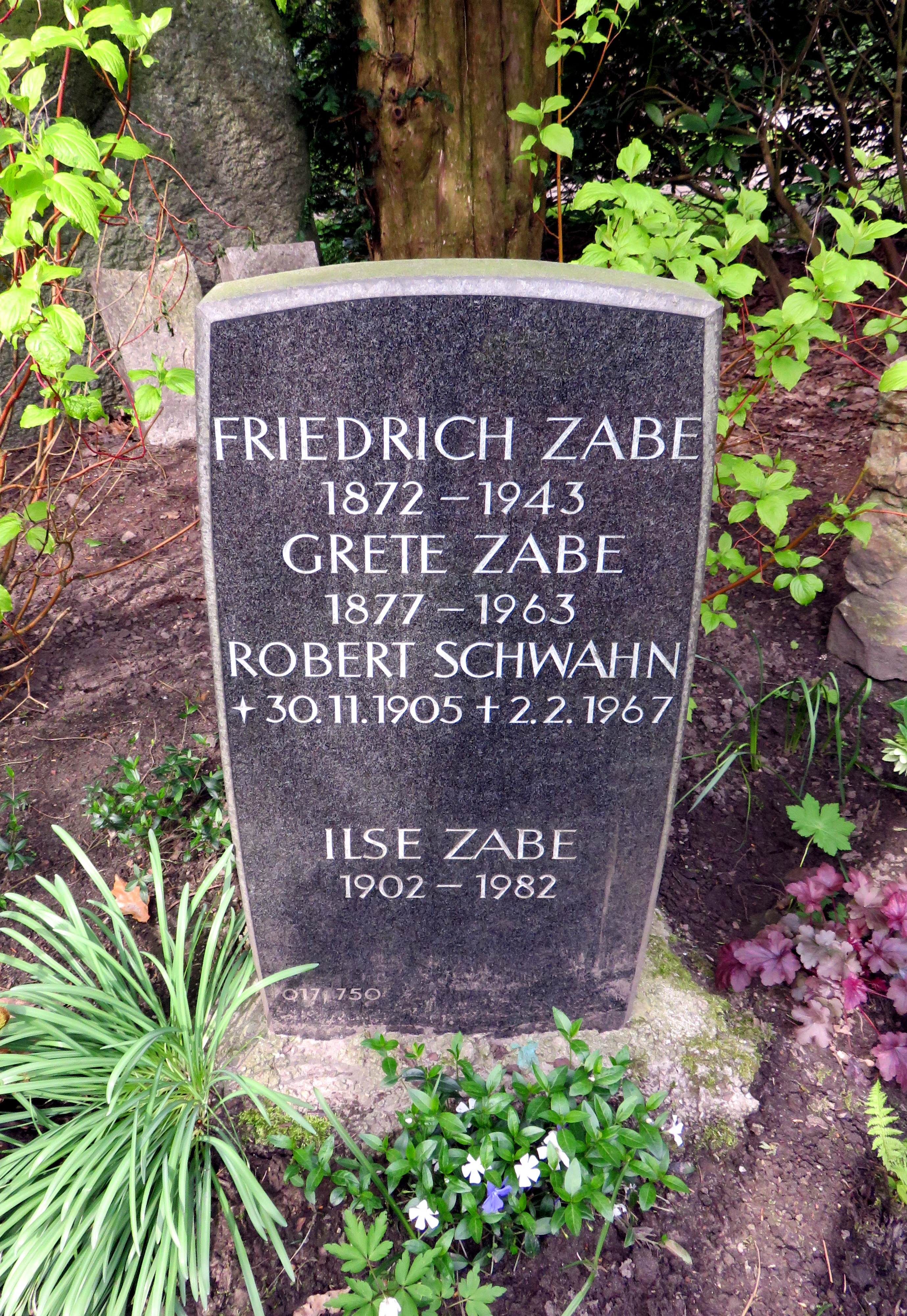 Historischer Grabstein der deutschen Politikerin Grete Zabe im Bereich des Gartens der Frauen auf dem Ohlsdorfer Friedhof in Hamburg-Ohlsdorf.